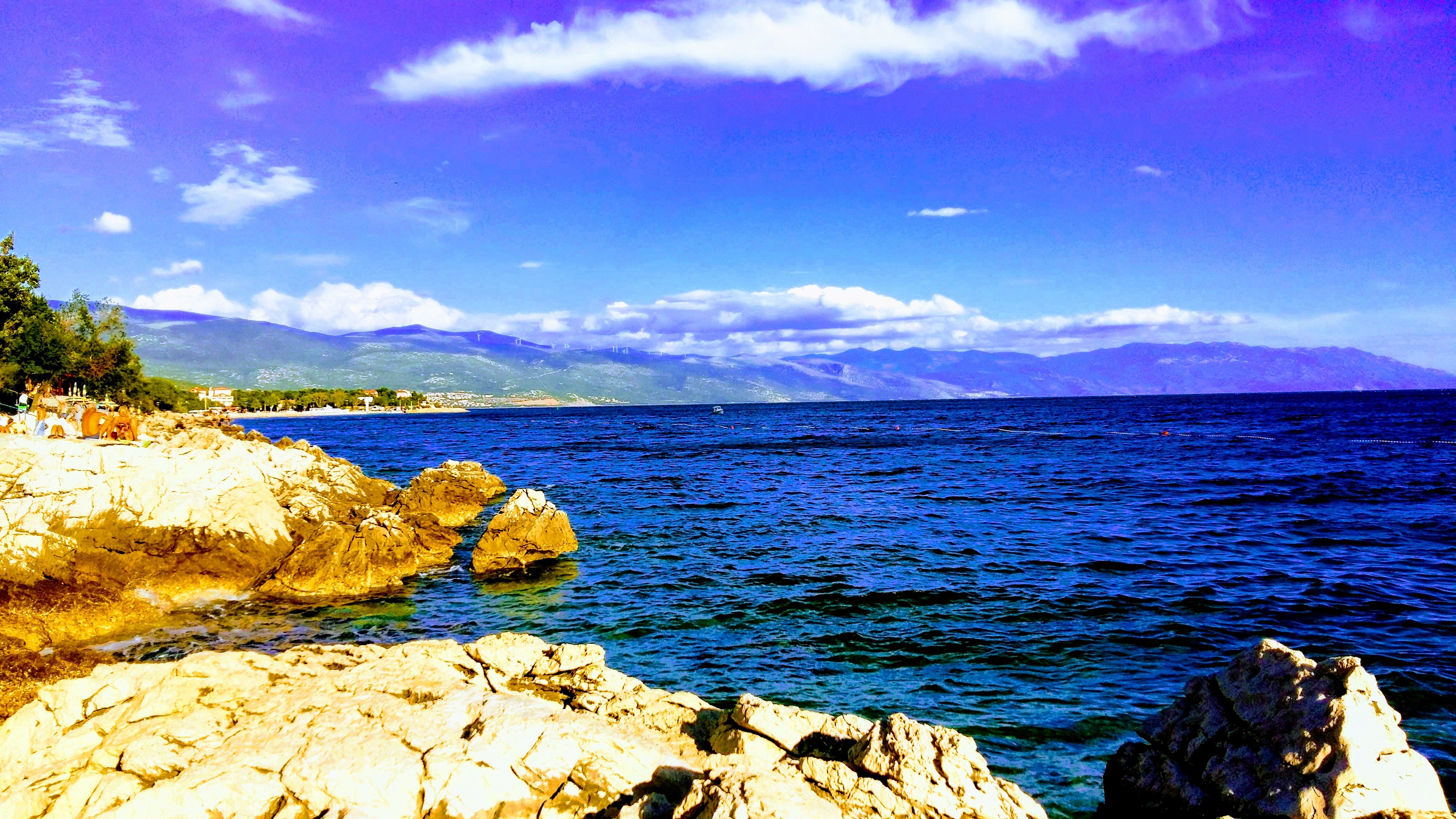 Pogled sa plaže, Novi Vinodolski